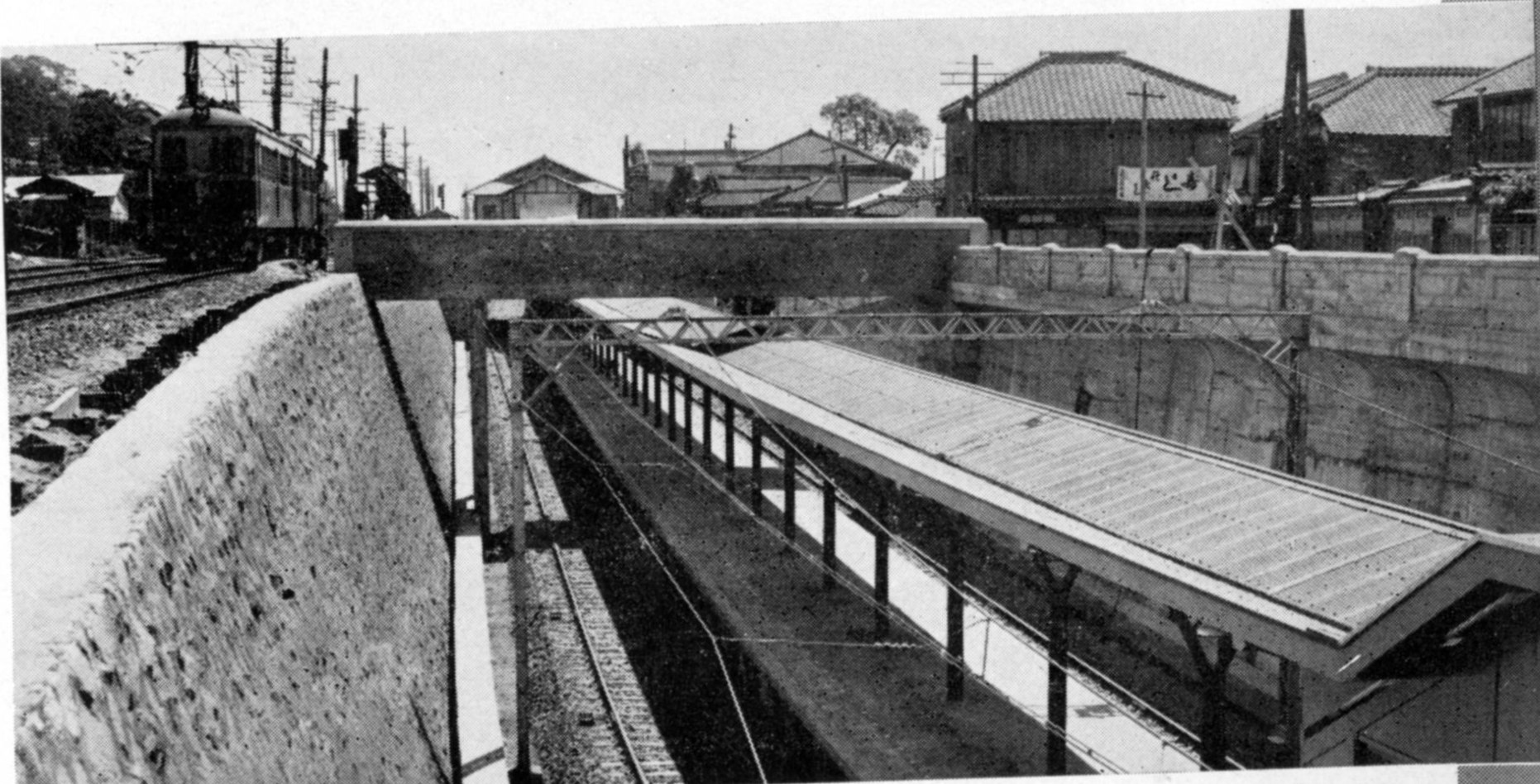 開通間近の地下線に完成した阪神岩屋駅。左は仮線。實地踏測神戸市街全圖(1935年12月25日印刷、1936年1月5日発行)(国際日本文化研究センター所蔵地図データベース)では、岩屋東口、岩屋西口が存在していた事が確認出来る。